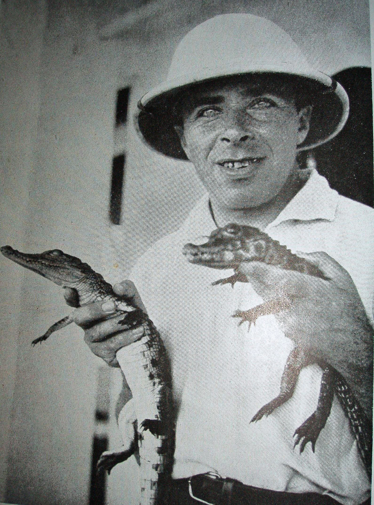 Cestovatel Jiří Baum - převzato z knihy "Pouští a pralesem" - 1945